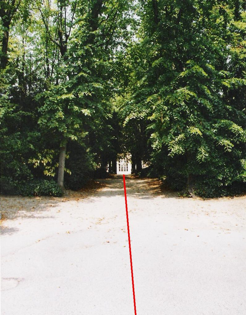 Arrière de l'Observatoire de Paris.